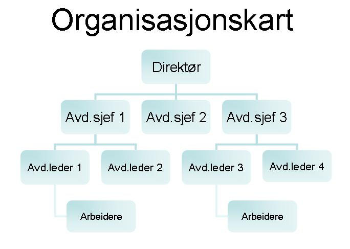 Hierarki: Organisasjonskart, eksempel